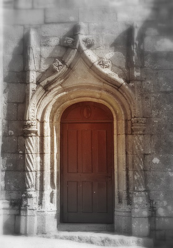 église Brasparts, denez goasguen.PD